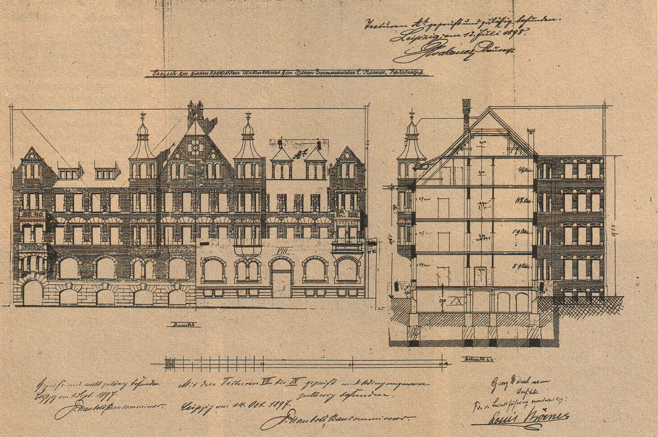 Brodyer Synagoge, Leipzig, Bauzeichnung zum Umbau des Gebäudes aus der Bauakte, 1897.